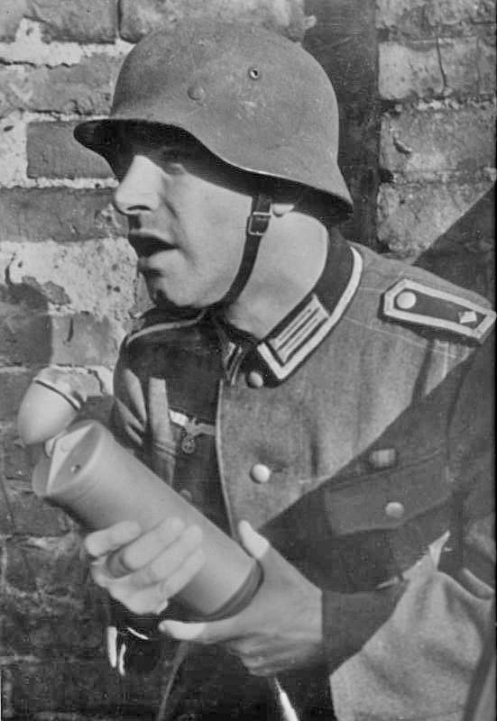 PK-Berichter schildert den Kampf aus nächster Nähe. So entstanden viele Frontberichte, die wir so oft im Rundfunk hörten. Im Schutz weniger noch stehender Mauern schilderte hier der PK-Berichter das Kriegserlebnis seiner Kameraden aus unmittelbarer Nähe. PK - Dick - Scherl 6.12.40